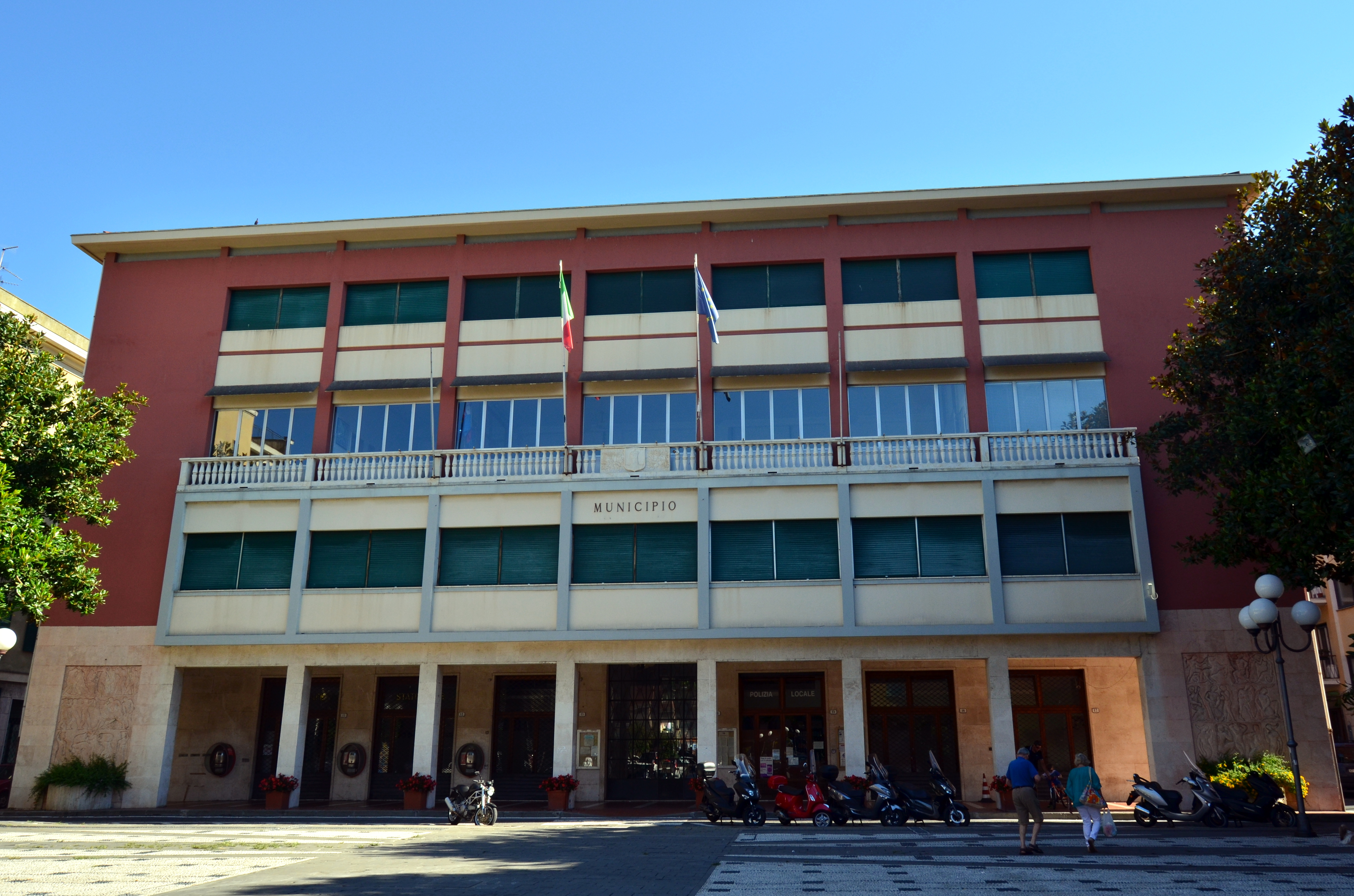 Il municipio di Recco, Liguria, Italy